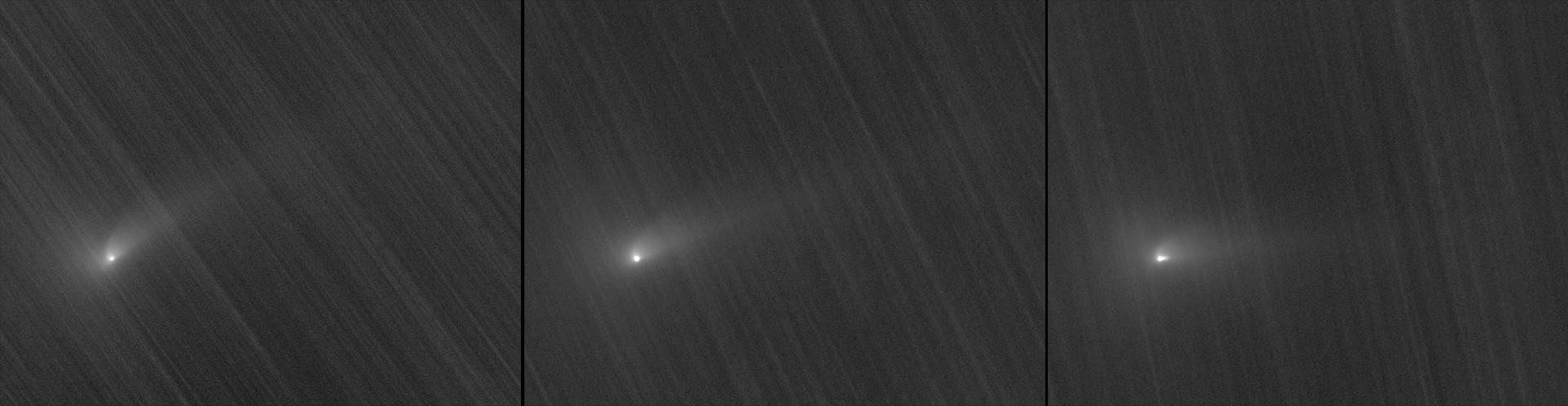 La comète C/2013 UQ_4 (Catalina), compilation d'images des 9, 10 et 11 juillet 2014 montrant l'évolution de l'aspect de la comète avec la position relative de celle-ci par rapport à la terre (le périgée ayant été atteint le 10 juillet).